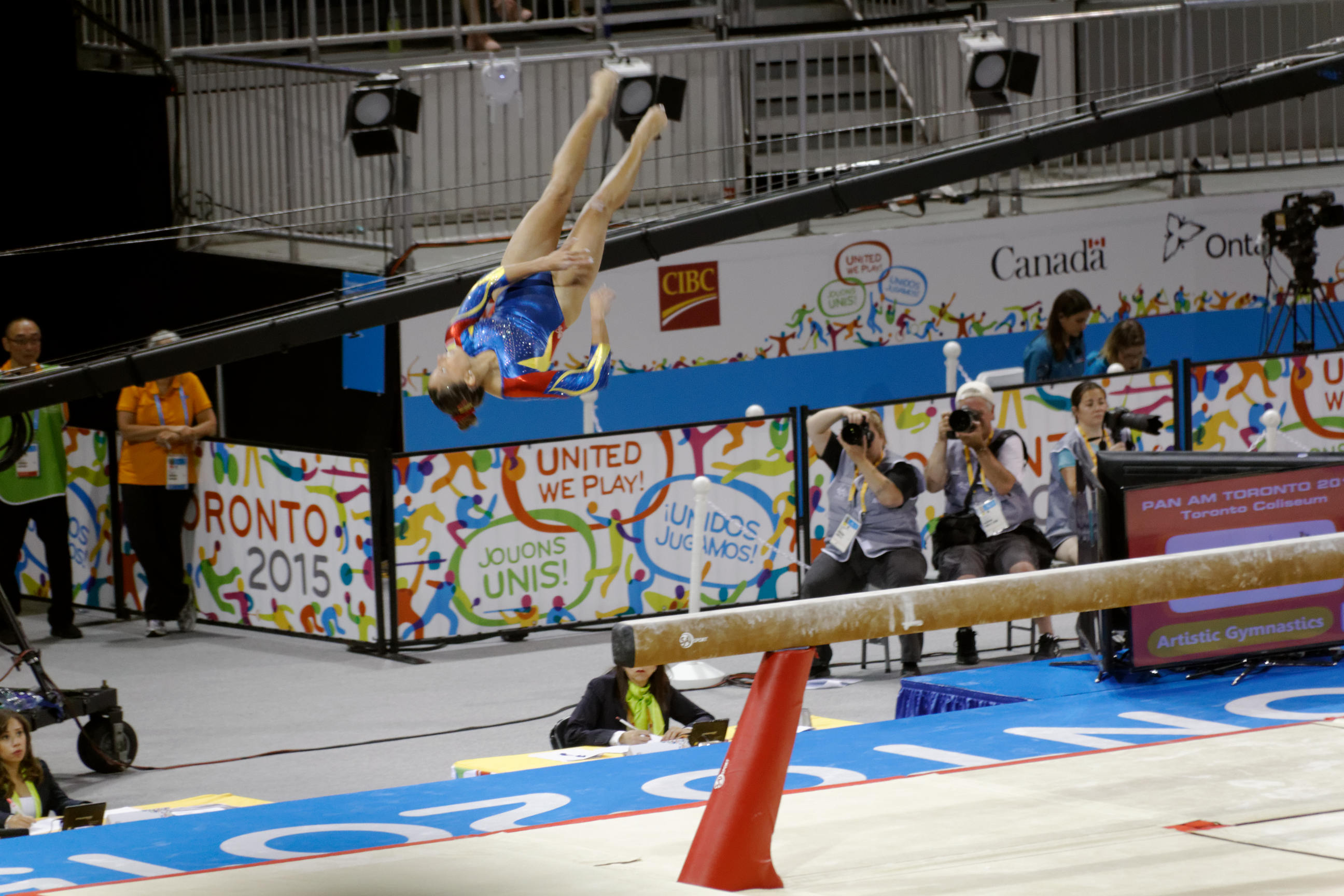 Balance 7